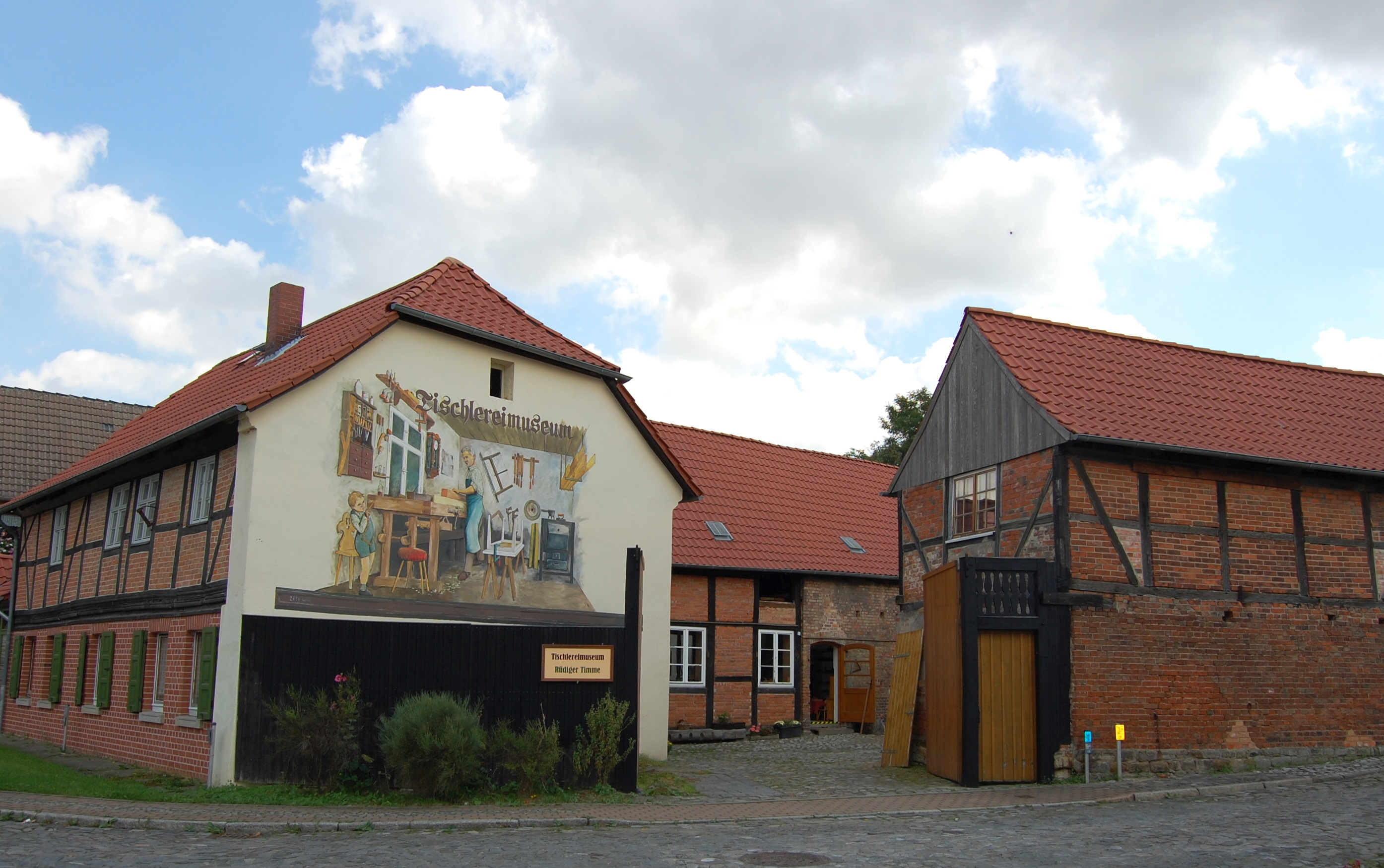 Tischlereimuseum Rüdiger Timme, Eilsleben, Ostendstraße 2